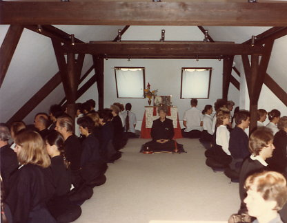 Brigitte D'Ortschy im Zendo Grünwald